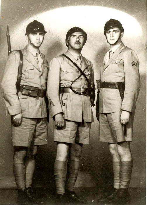 Клуге Константин Иванович с сыновьями Константином и Михаилом в Русской волонтерской роте французской концессии в Шанхае. 1930-е гг.